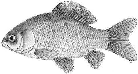 Crucian carp (Carassius carassius)